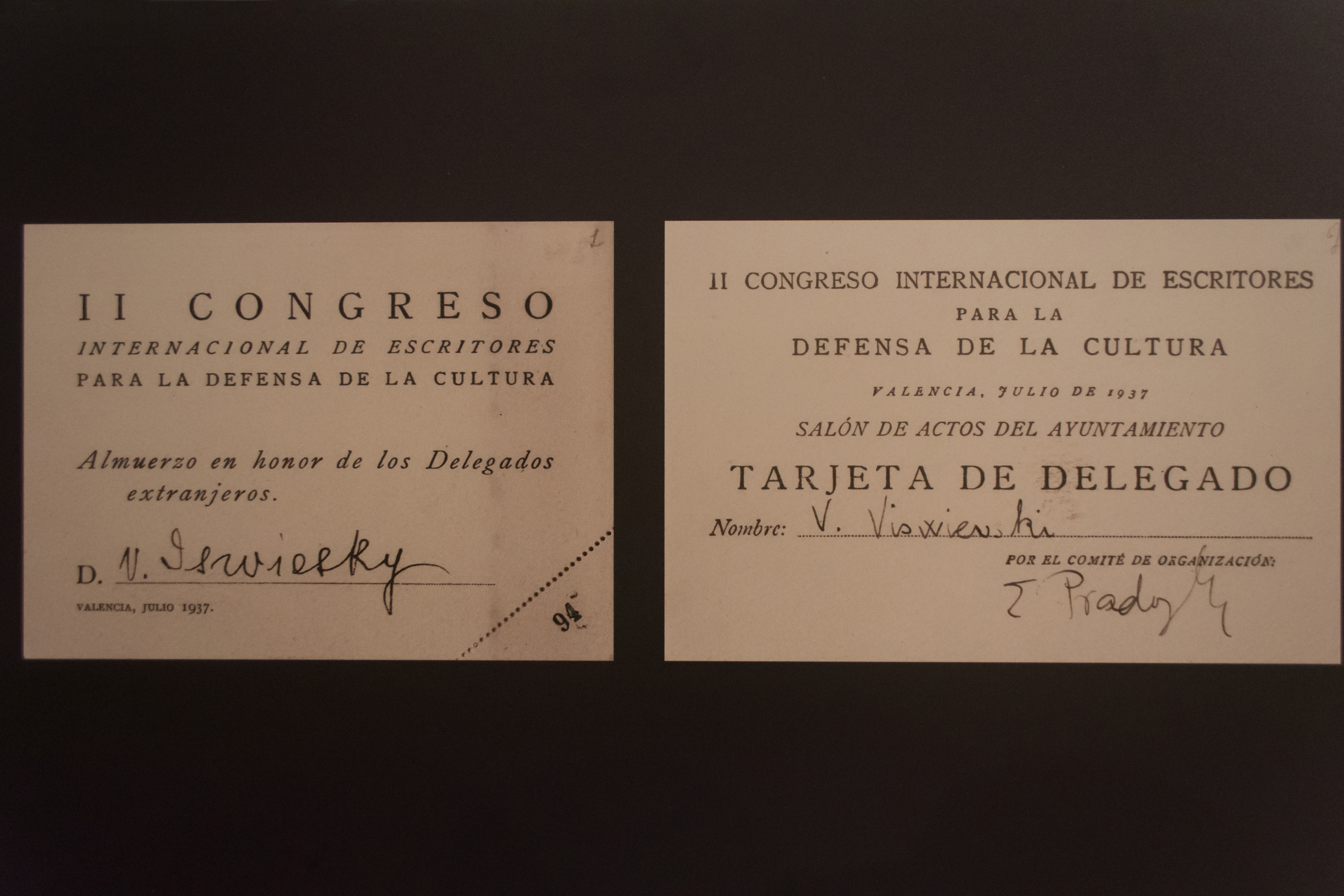 Segundo Congreso Internacional de Escritores para la Defensa de la Cultura. Exposición Por la defensa de la Cultura en el Centro del Carmen de Valencia.